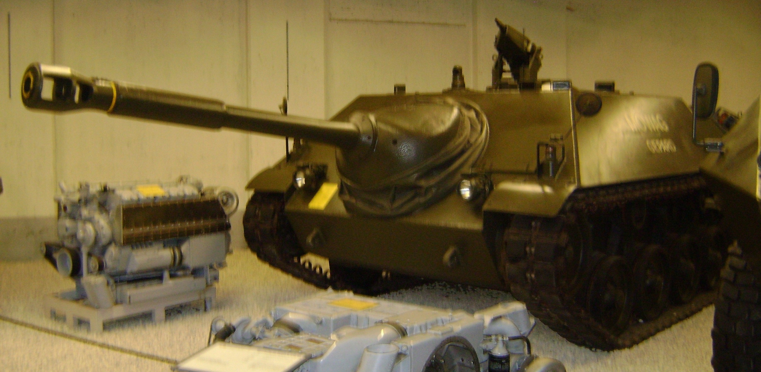 MOWAG Gepard Jagdpanzer